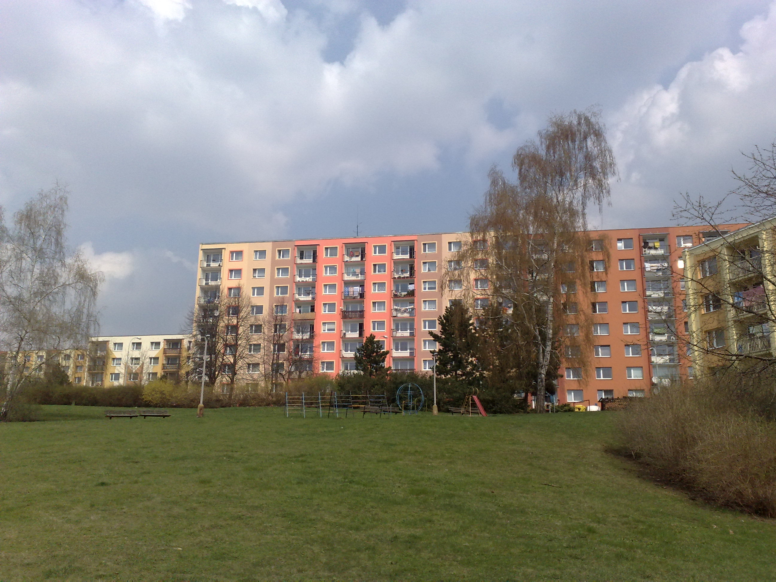 Část města Ústí nad Labem: Stříbrníky a Dobětice.